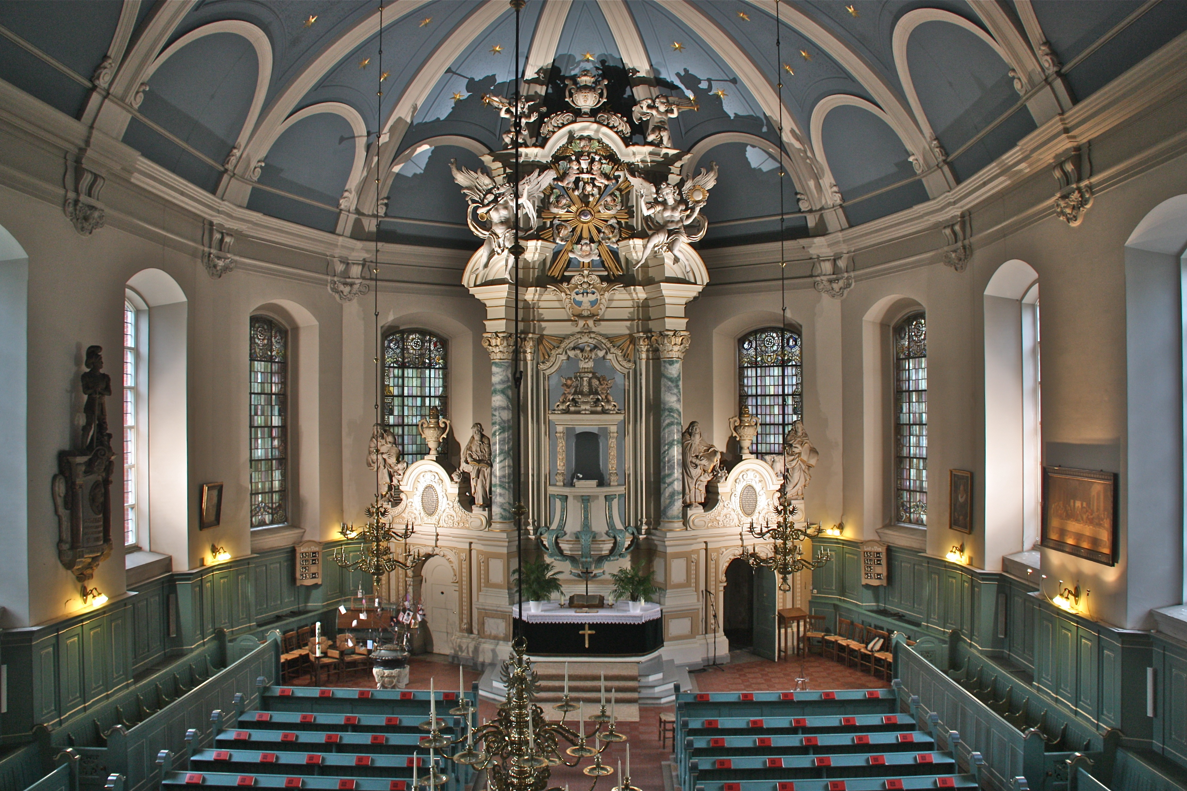 Hamburg, Billwerder, Kirche St. Nikolai, Innenraum, Blick von der OrgelemporeThis is a photograph of an architectural monument.